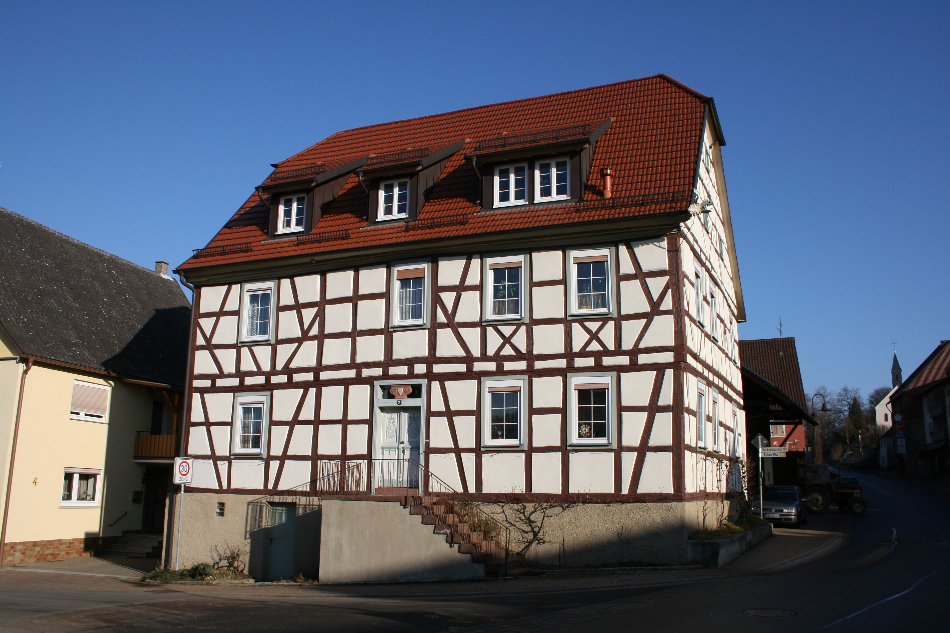 Fachwerkhaus in Unterschefflenz. Die Inschrift über der Tür zeigt die Jahreszahl 1709.